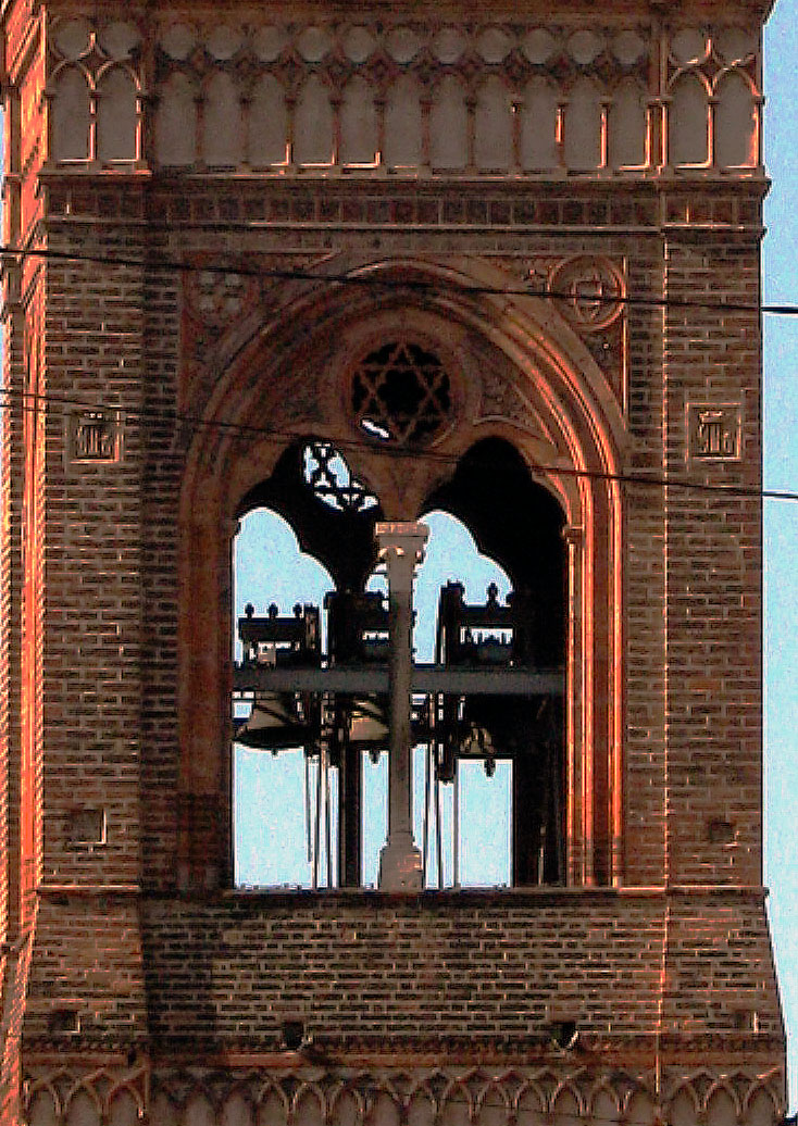 Dettaglio del campanile di S. Maria in Via a Monza